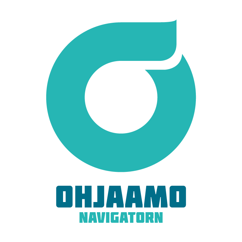 Ohjaamon logo